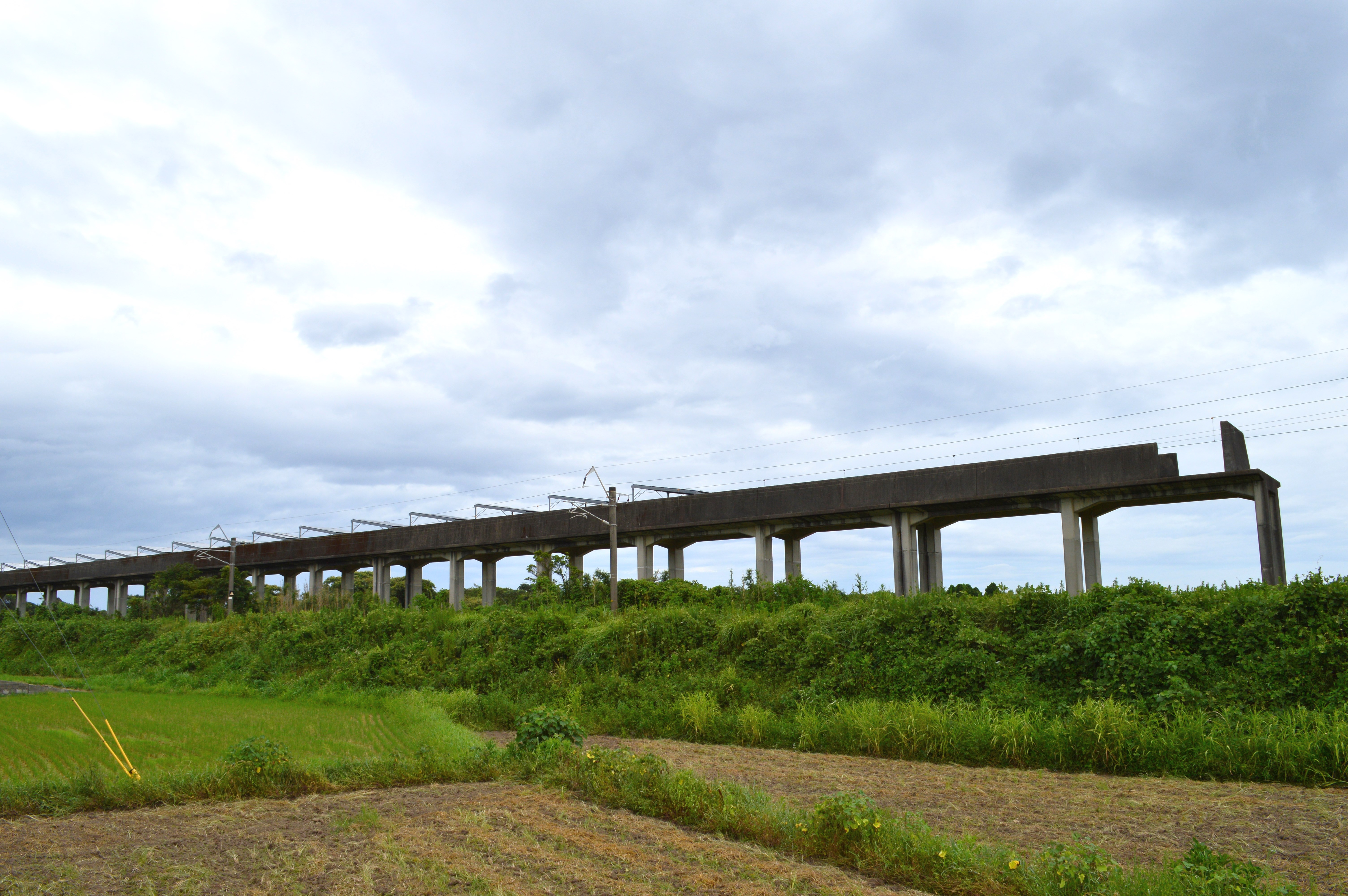 宮崎リニア実験線 都農側末端